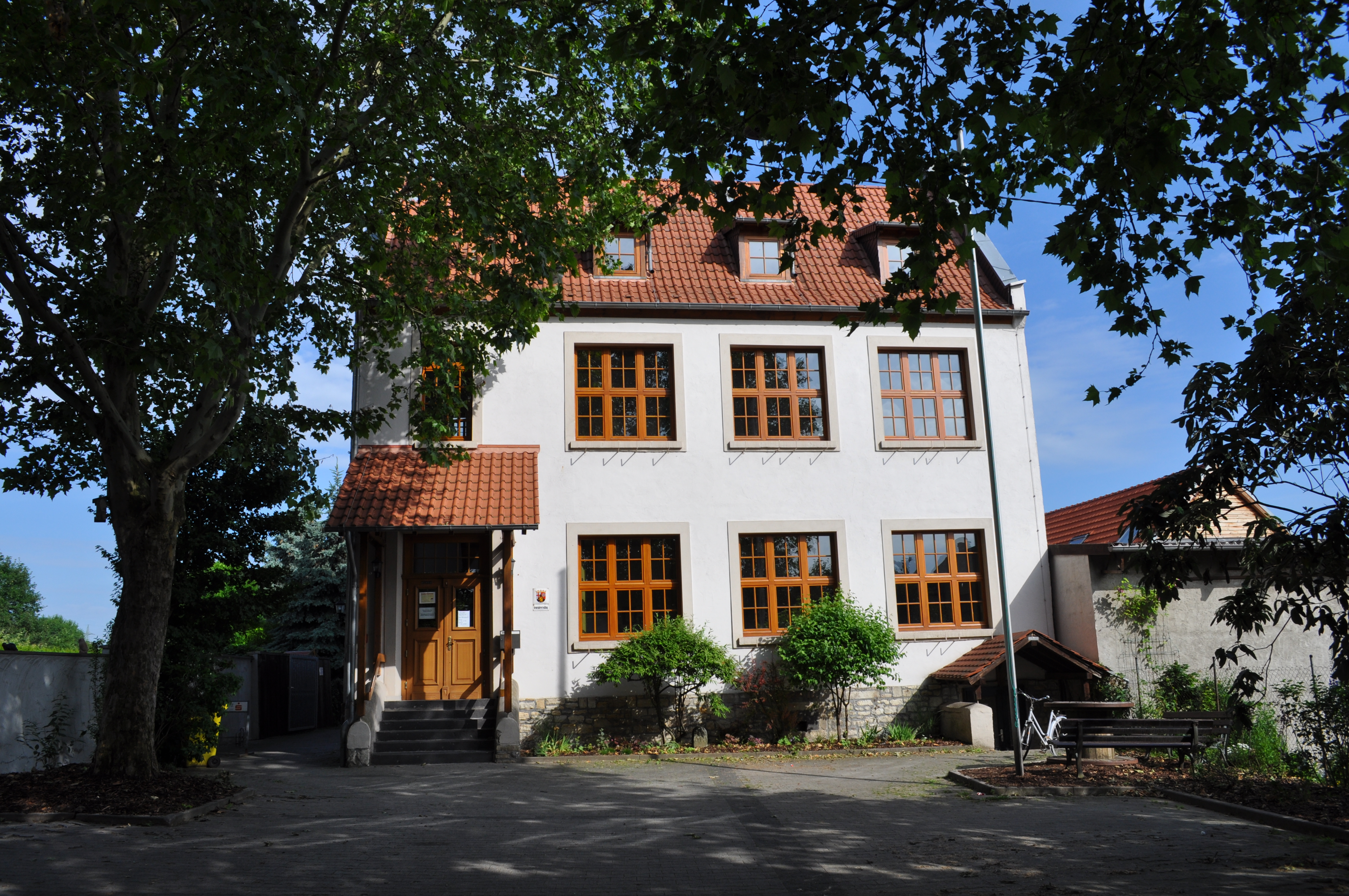 Altes Rathaus in Dexheim